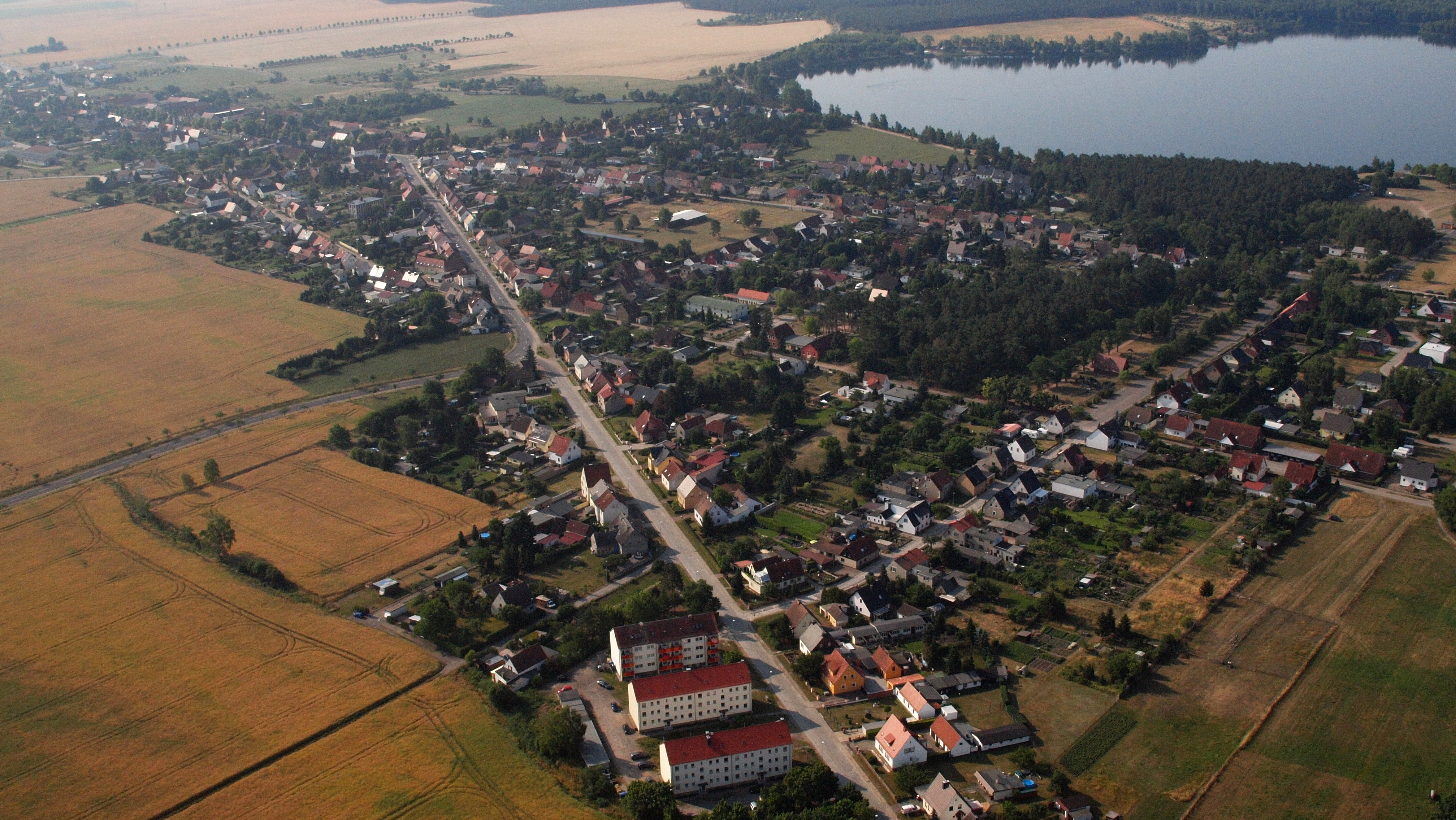 Bergwitz, Luftaufnahme (2015)